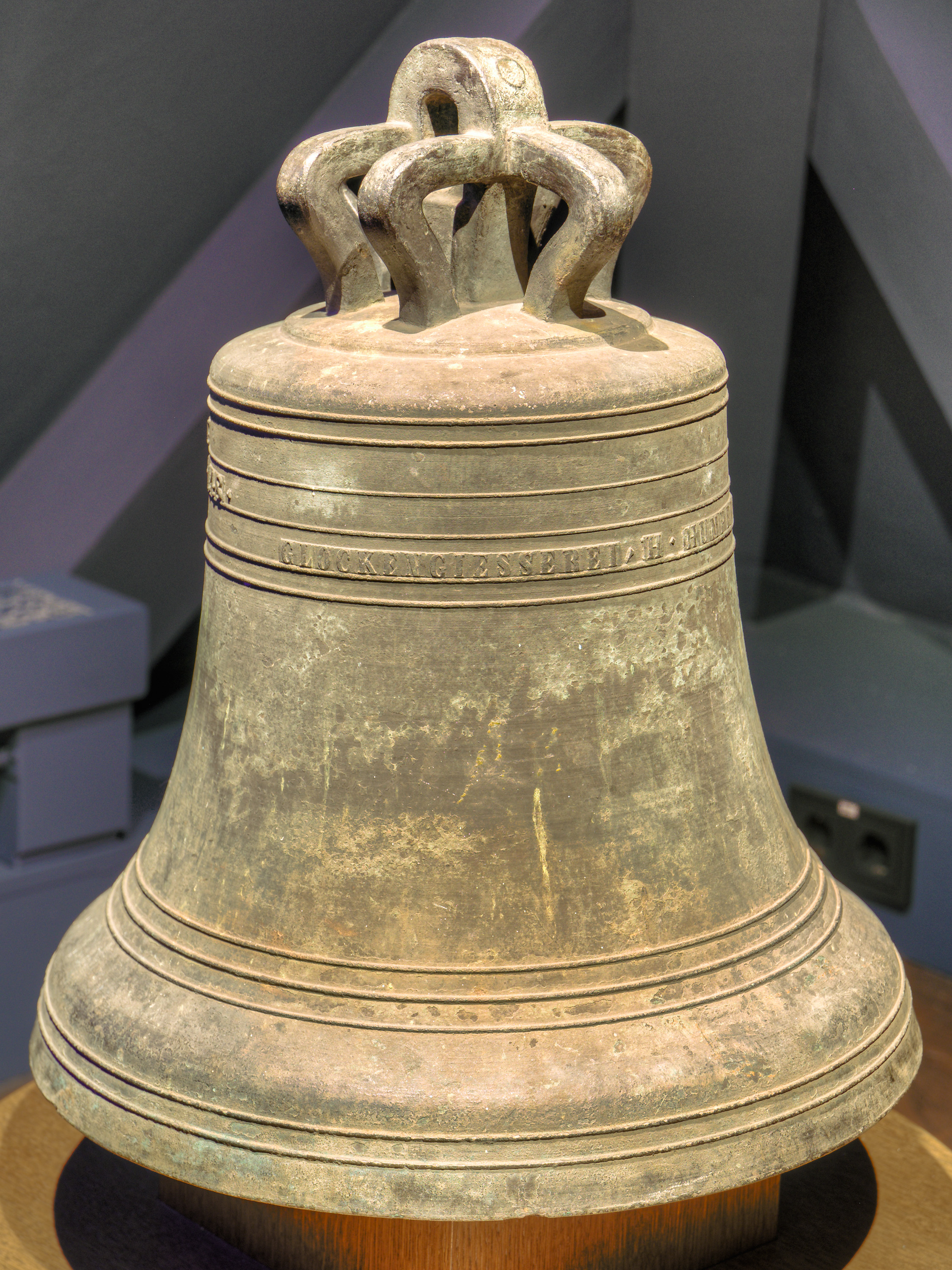 Glocke gegossen vom Briloner Glockengießer Franz Humpert im Jahr 1912.